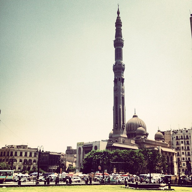 مسجد الفتح بالقاهرة